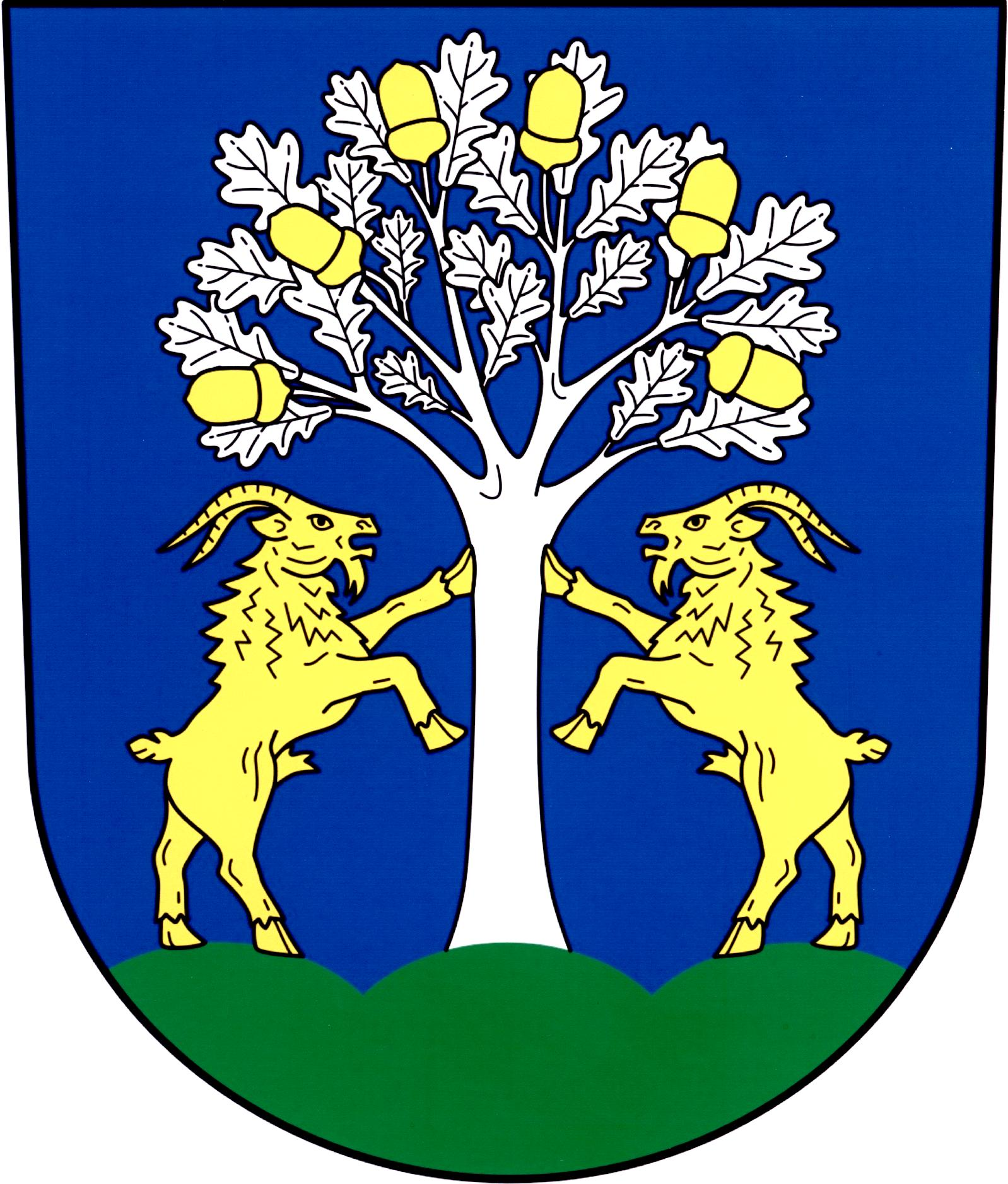 Znak obce Prštice